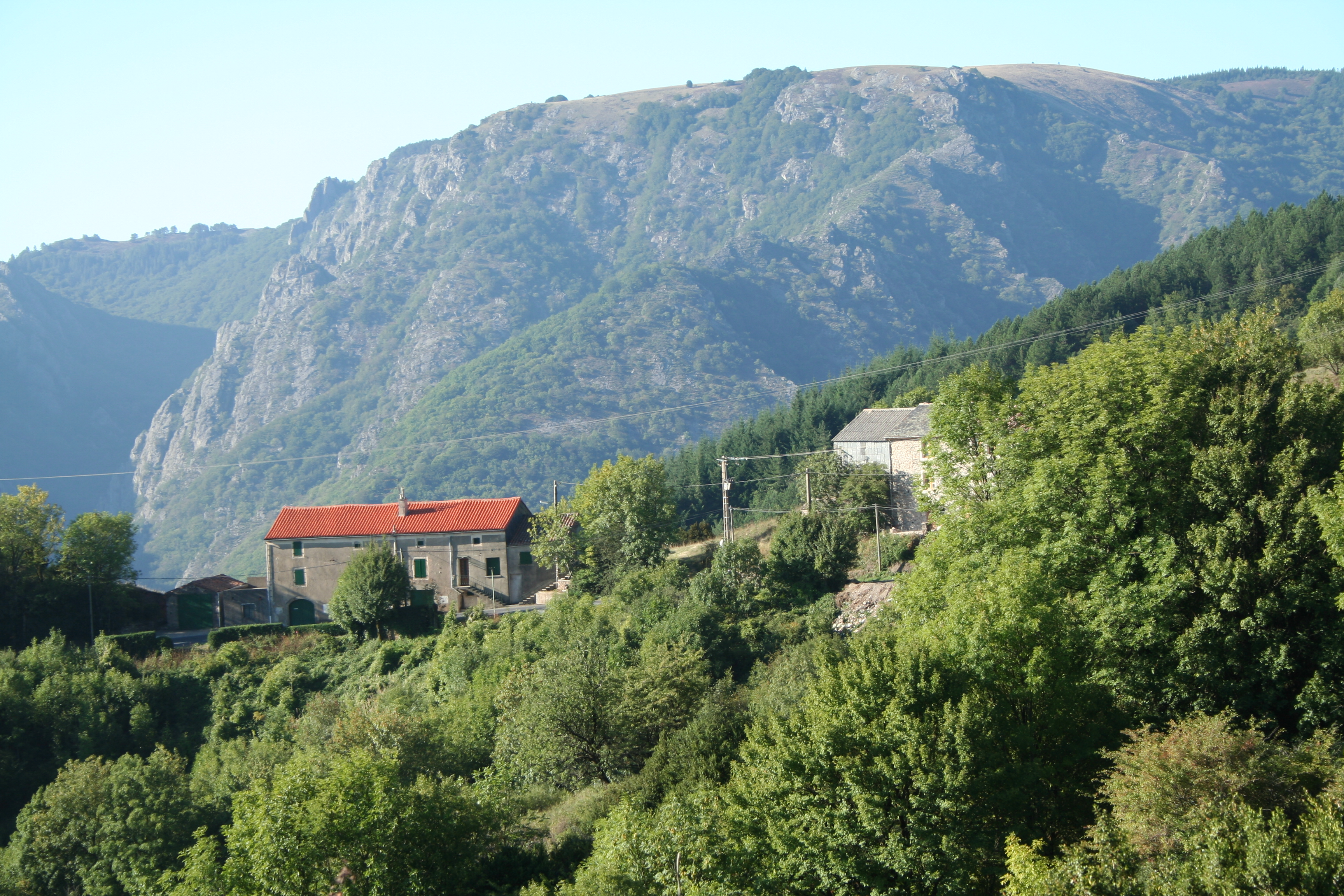 Castanet-le-Haut (Hérault) - Maisons de la Croix de Mounis (810 m) - Massif de l'Espinouse en arrière plan. La route vers le Tarn et l'Aveyron passe devant les maisons.